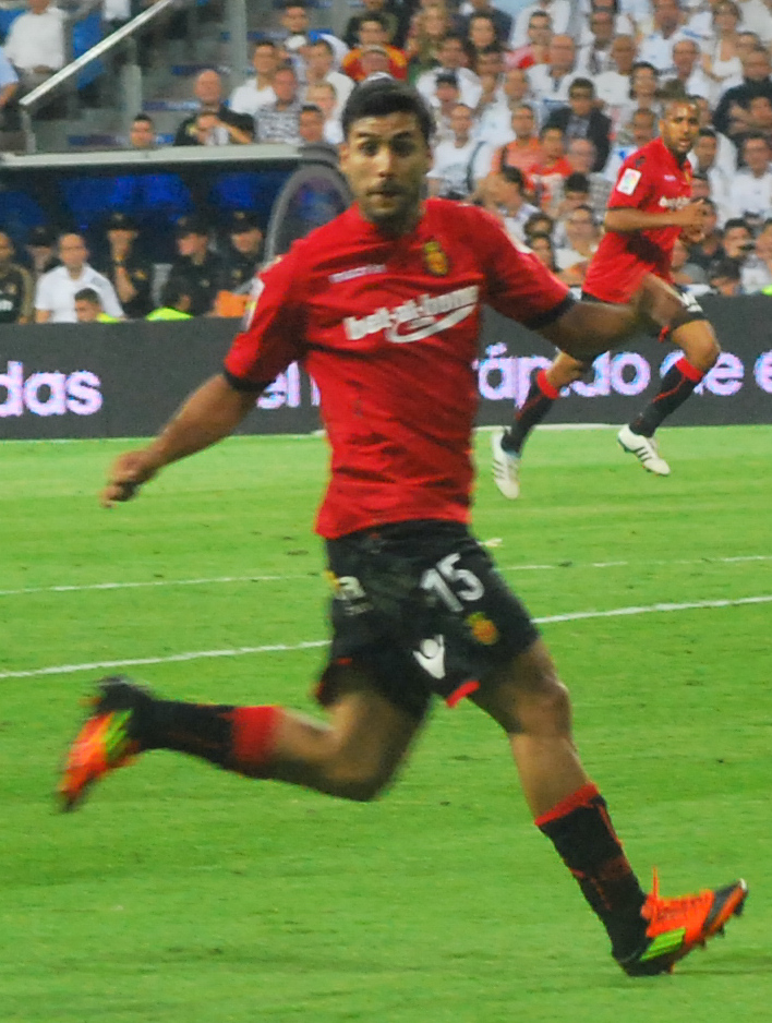 Pablo Cáceres Rodríguez playing for Mallorca.